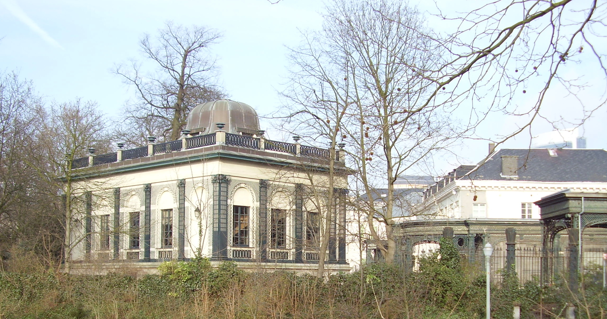 Vauxhall Bruxelles 2007 - Belgique